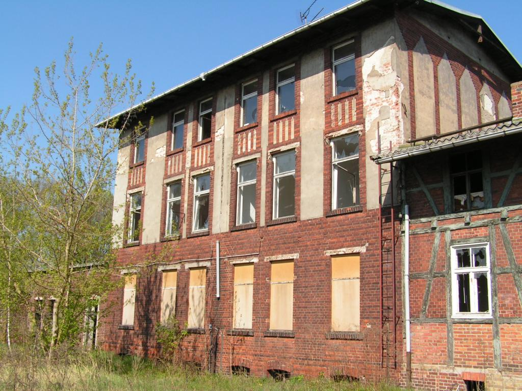 selbst fotografiert